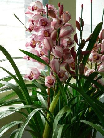 大花蕙兰 拍摄